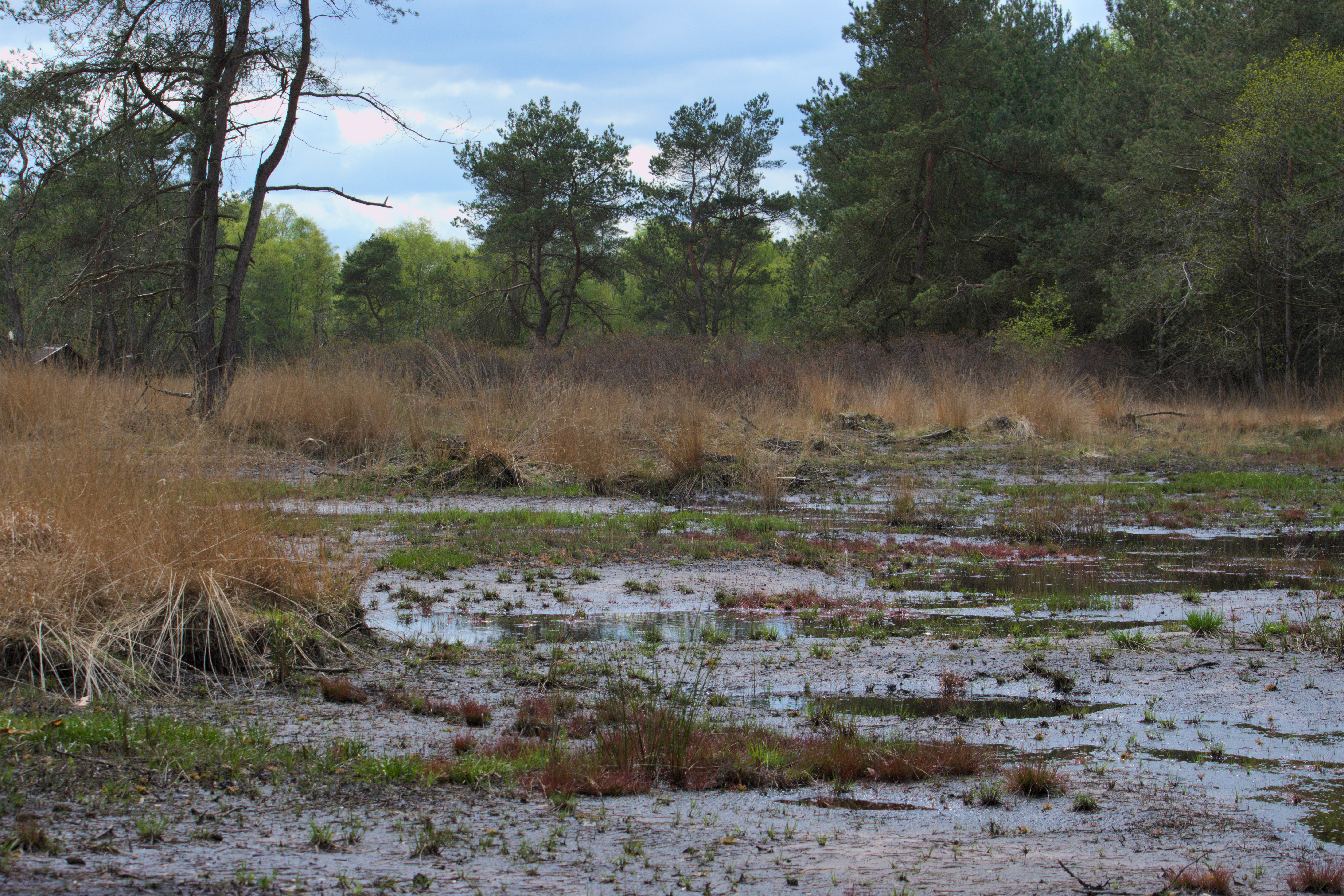 Renaturiertes Hochmoor im NSG Harskamp (Kreis Steinfurt, NRW)